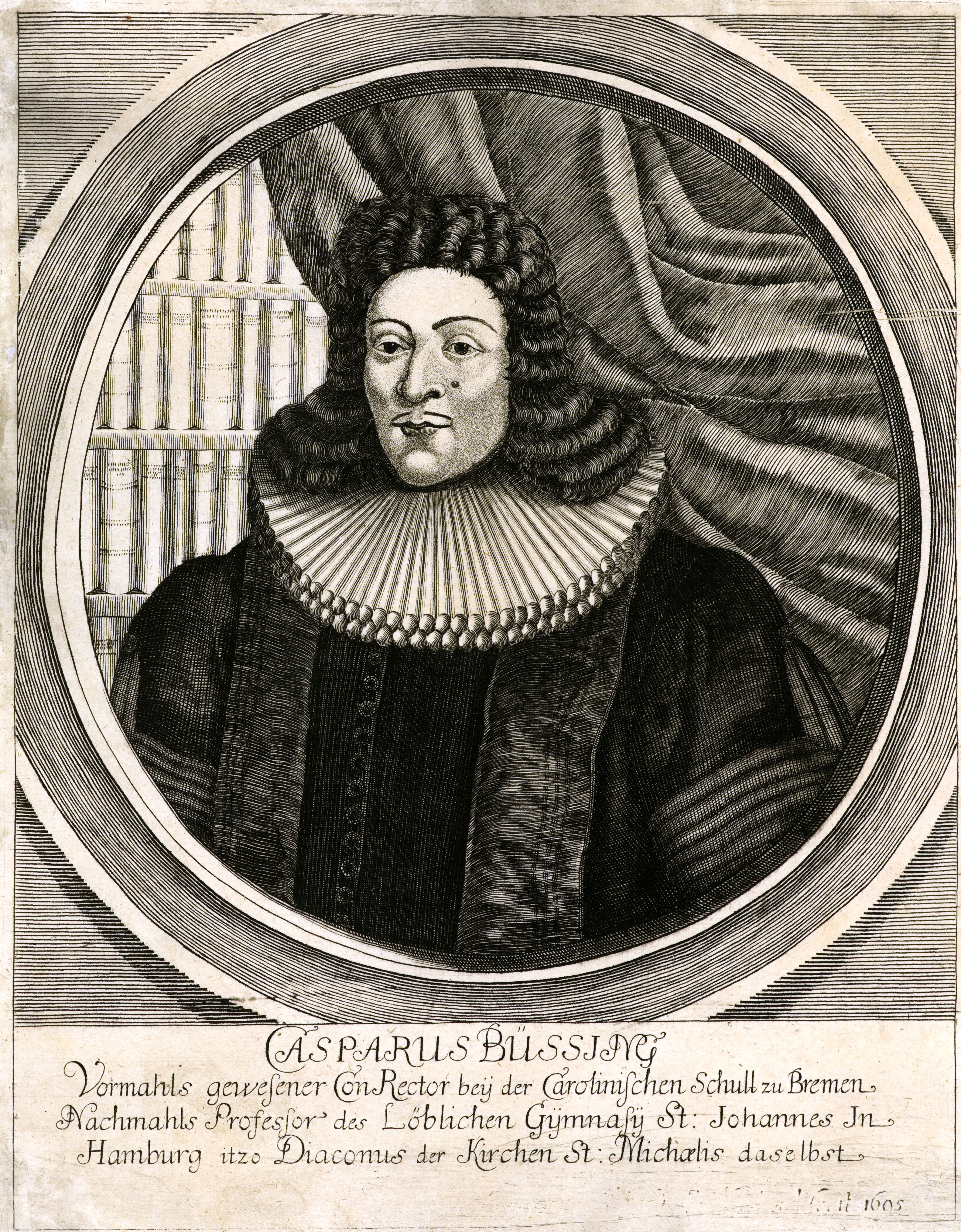 Casparus Büssing